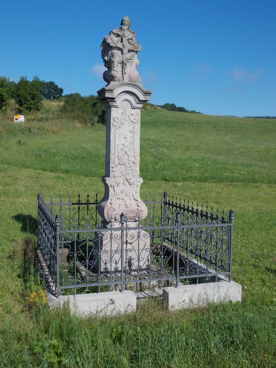 Sousoší Nejsvětější Trojice (Vrchovina), u komunikace Nová Paka - Čistá, Vrchovina